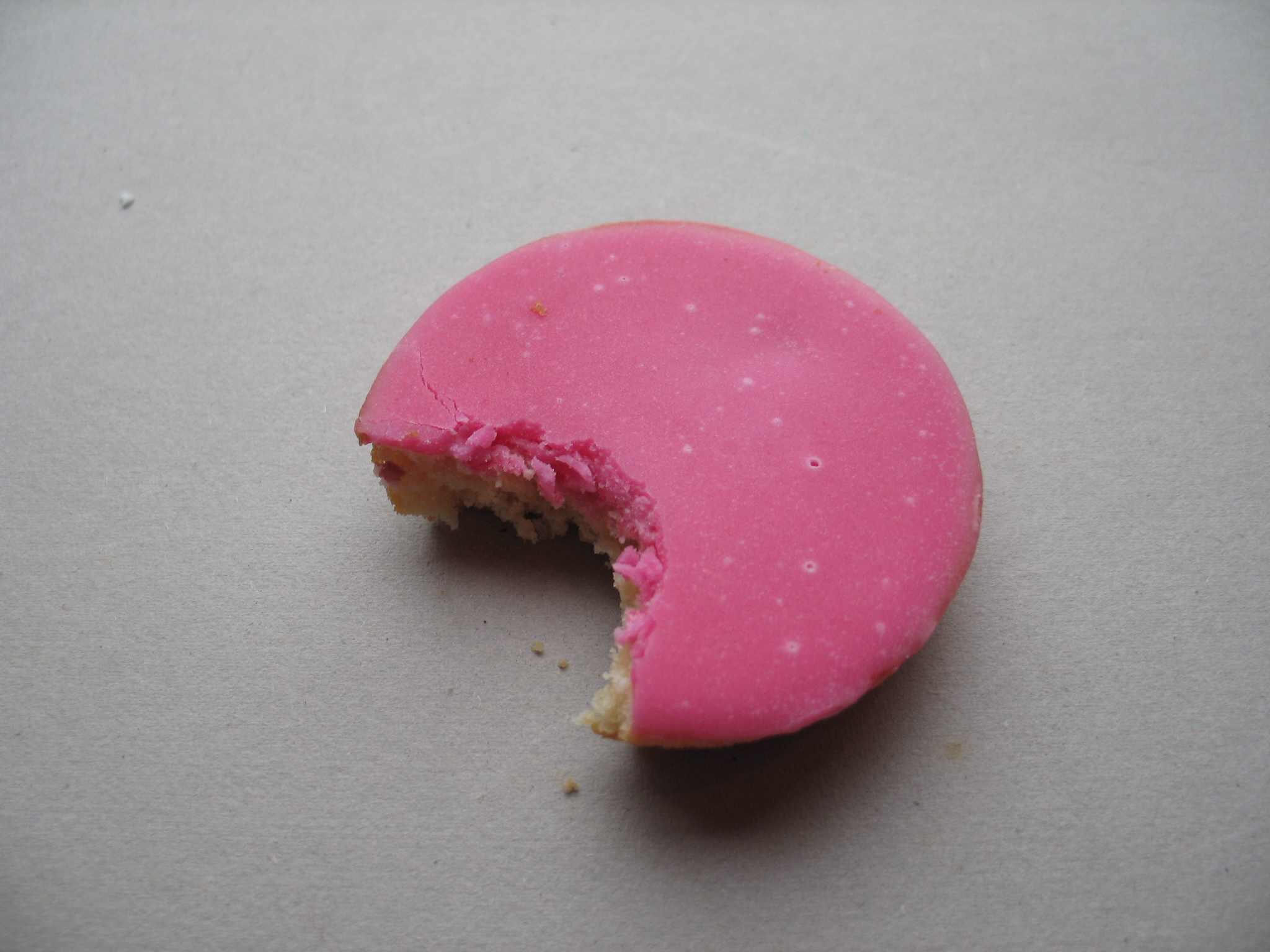 Roze koek met een hap eruit